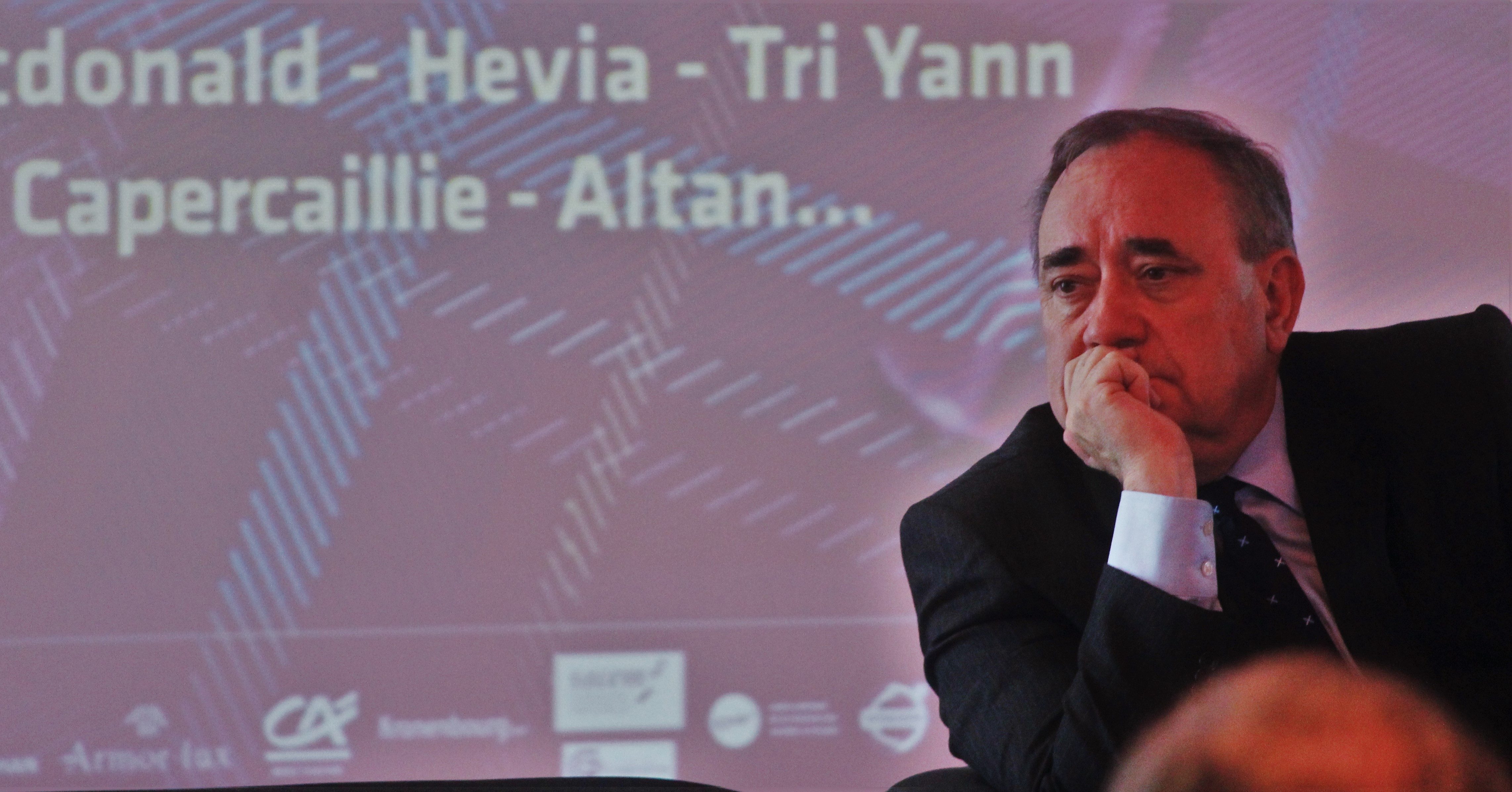 Conférence d'Alex Salmond lors du festival interceltique de Lorient 2017.